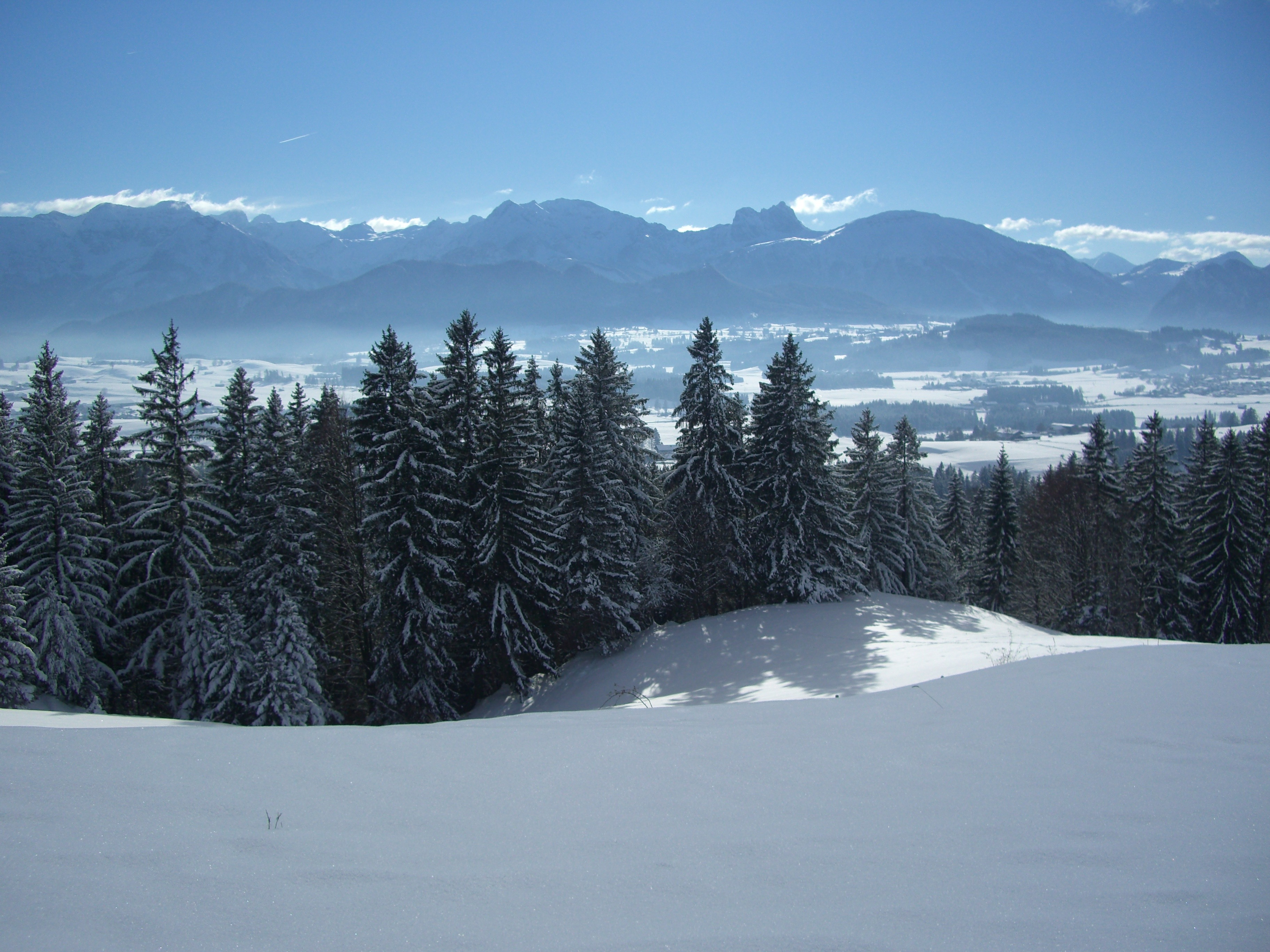 Jodła English | Polski | +/−